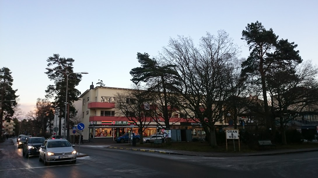 Finn Malmgrens väg genomkorsar. I bakgrunden ser man flera tallar och ekar.